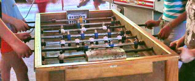 Jovenes jugando a Taca-Taca público (Chile)